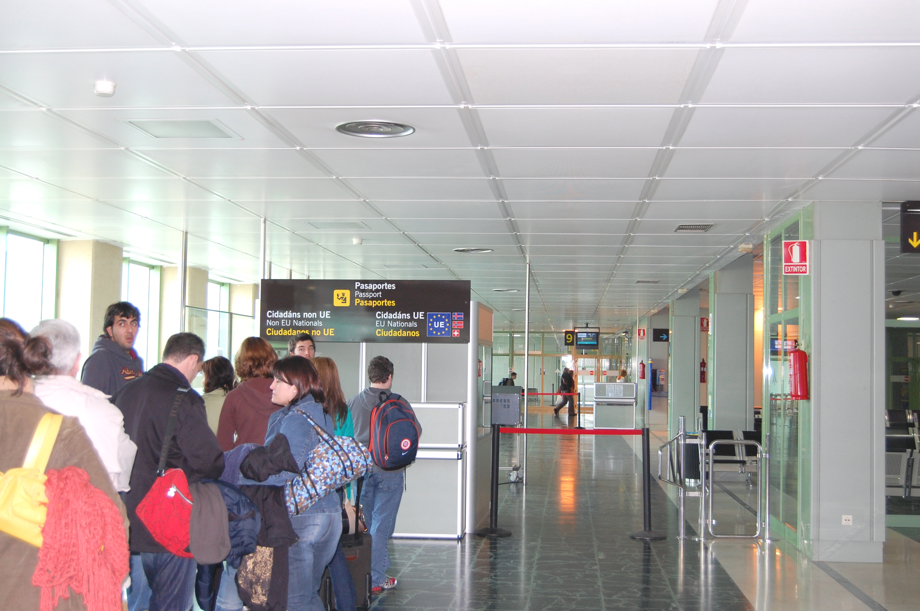 O Aeroporto de Santiago de Compostela, Galicia, Espanha.